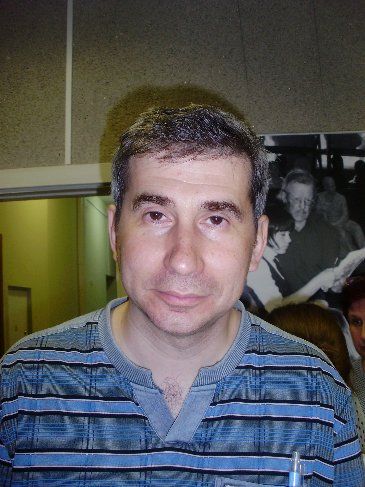 Анатолий Подольский, директор Украинского Центра изучения истории Холокоста